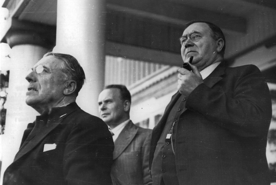 Bildet er tatt på sydsiden av Hotell Knausen mens det foregikk kamper mellom britiske krigsskip og tyske fly på fjorden. Statsminister Nygaardsvold til høyre og Olav Hindahl i bakgrunnen. Ukjent person i forgrunnen.